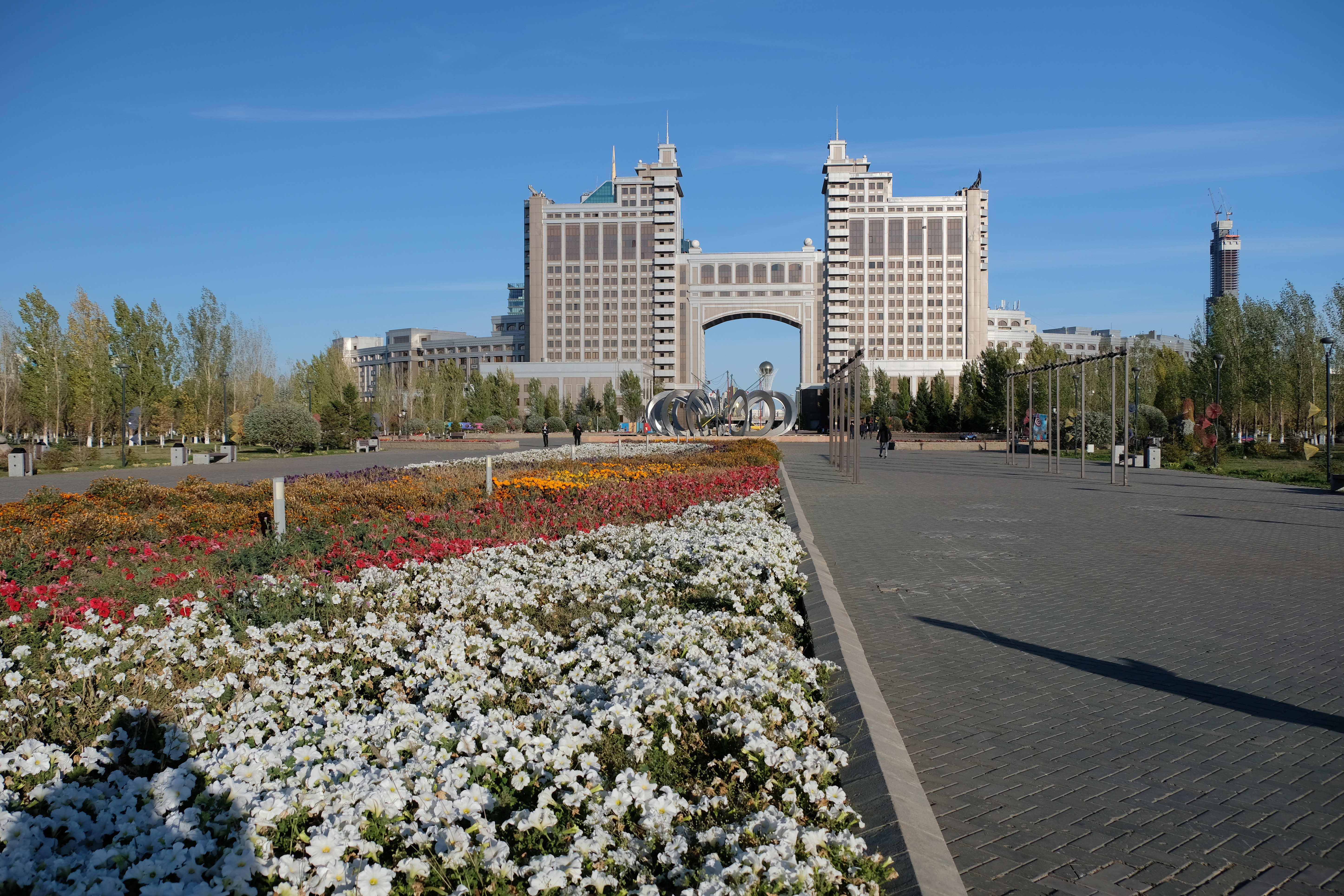 KazMunayGas